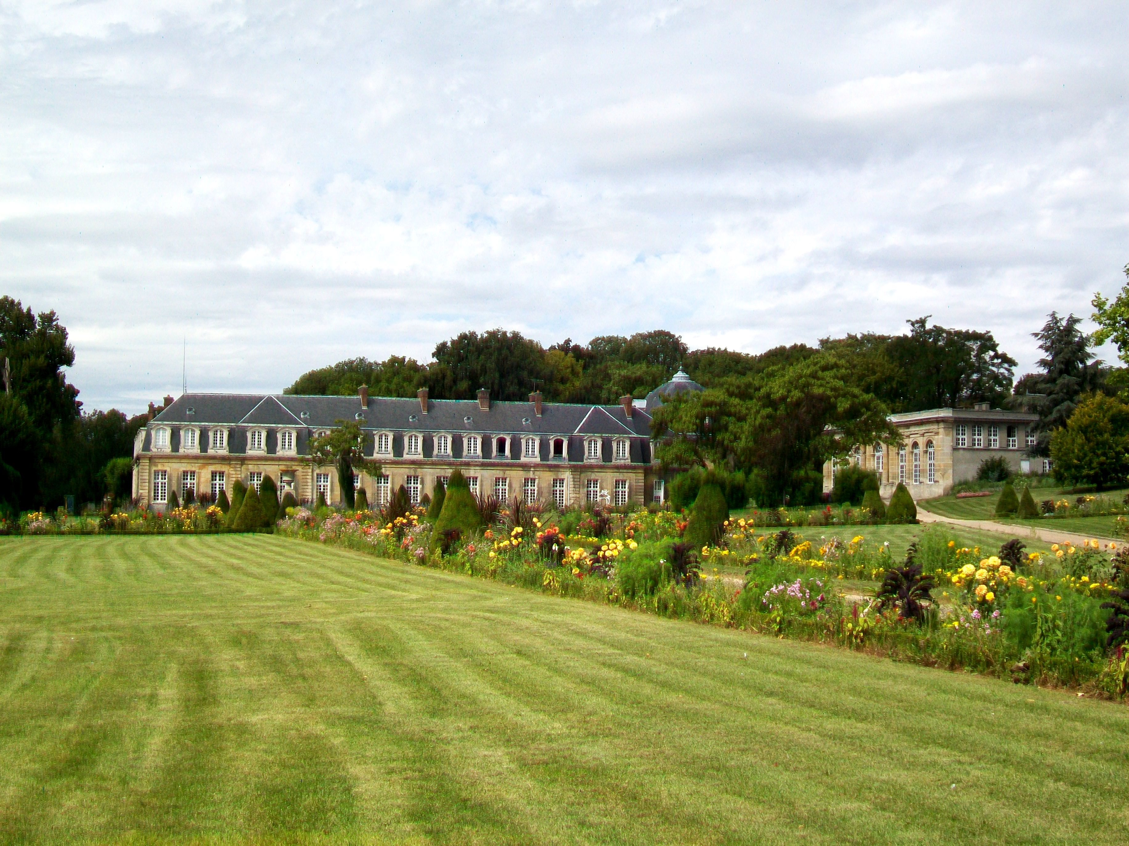 Le château et l'orangerie (à droite), depuis l'entrée rue du Râtelier.